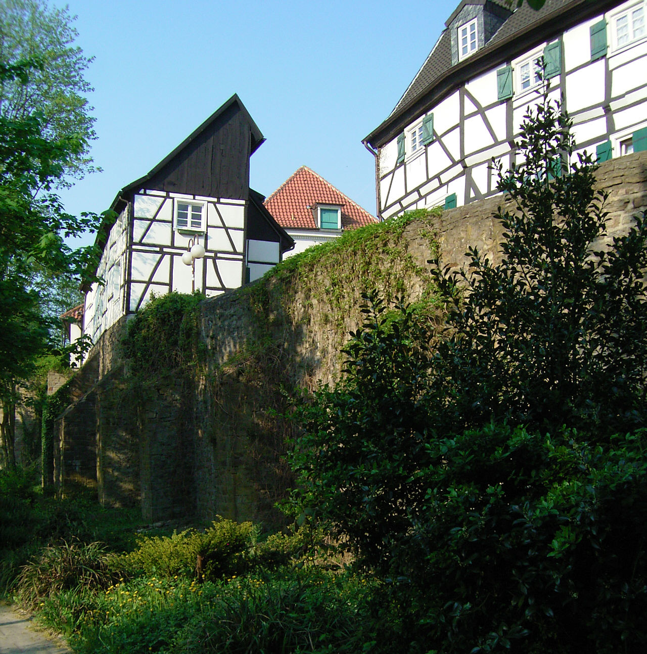 Ein Teil der noch erhaltenen Stadtmauer Unnas, Deutschland. Auf der Mauer steht das Haus Ulrichswall 5, rechts ist die Rückseite des Hauses Kirchplatz 4 zu sehen. Dazwischen verläuft (verdeckt) die Straße Voßkuhle.